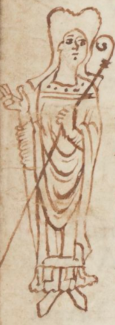 Saint Sylvain de Gaza.